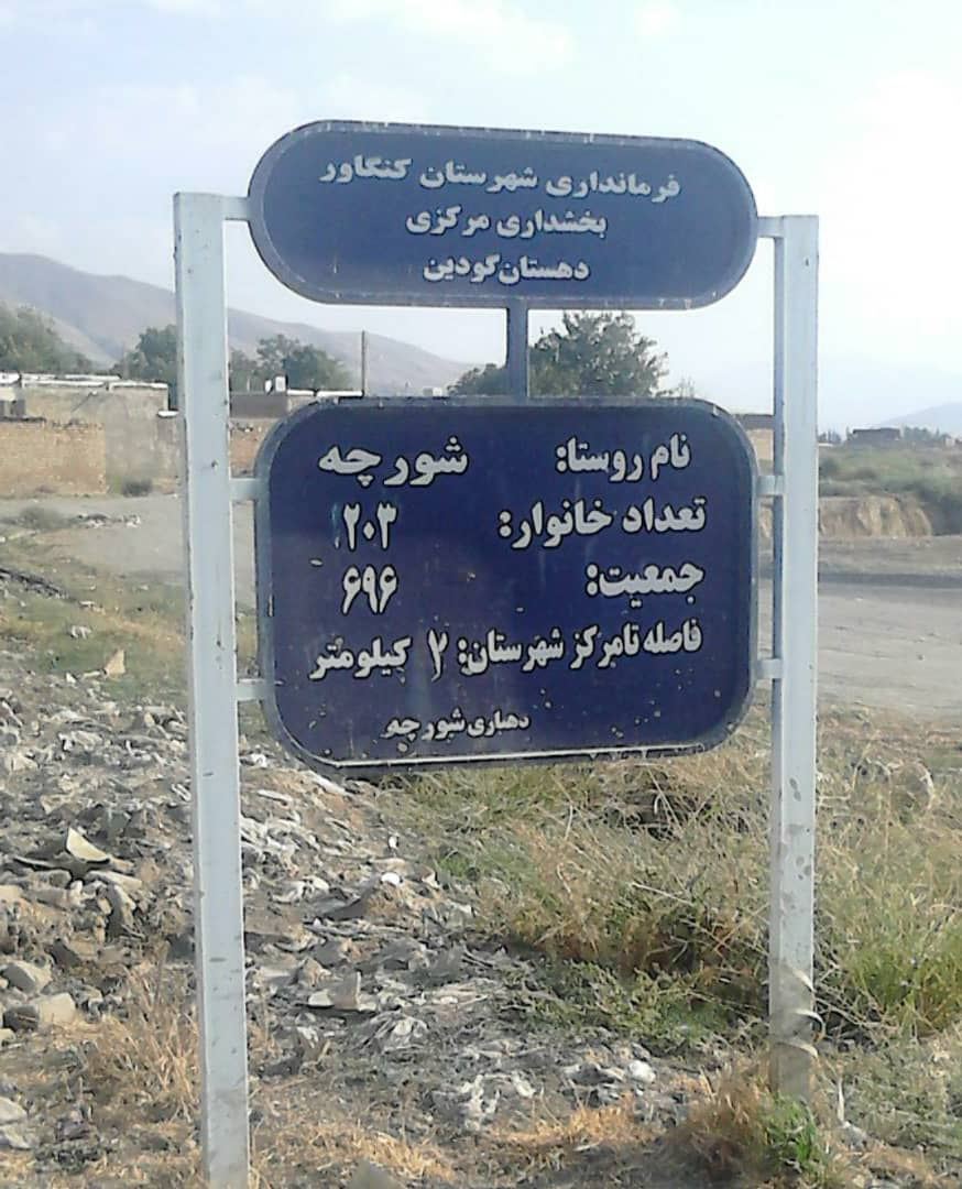 مشخصات جمعیتی روستای شورچه از توابع بخش مرکزی شهرستان کنگاور استان کرمانشاه. این تابلو طبق آخرین آمارگیری نفوس و مسکن ایران(سال ۱۳۹۵) تهیه شده است.